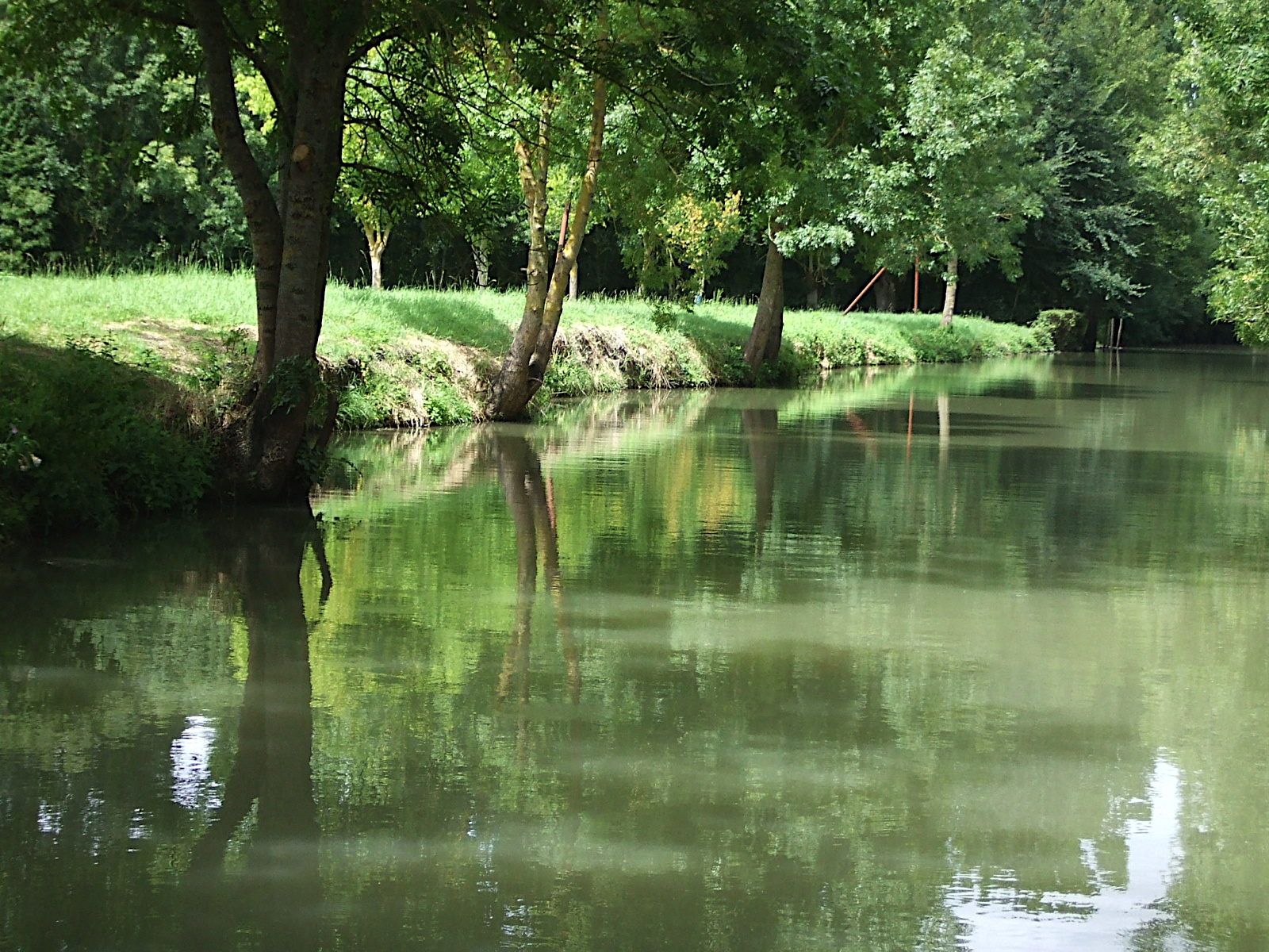 Le marais poitevin à La Garette